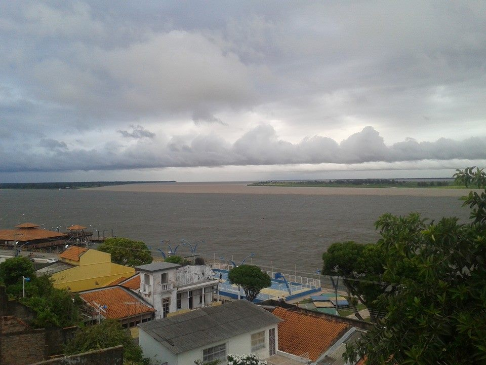 Encontro das águas do Rio Tapajós com o Rio Amazonas, na cidade de Santarém-PA.